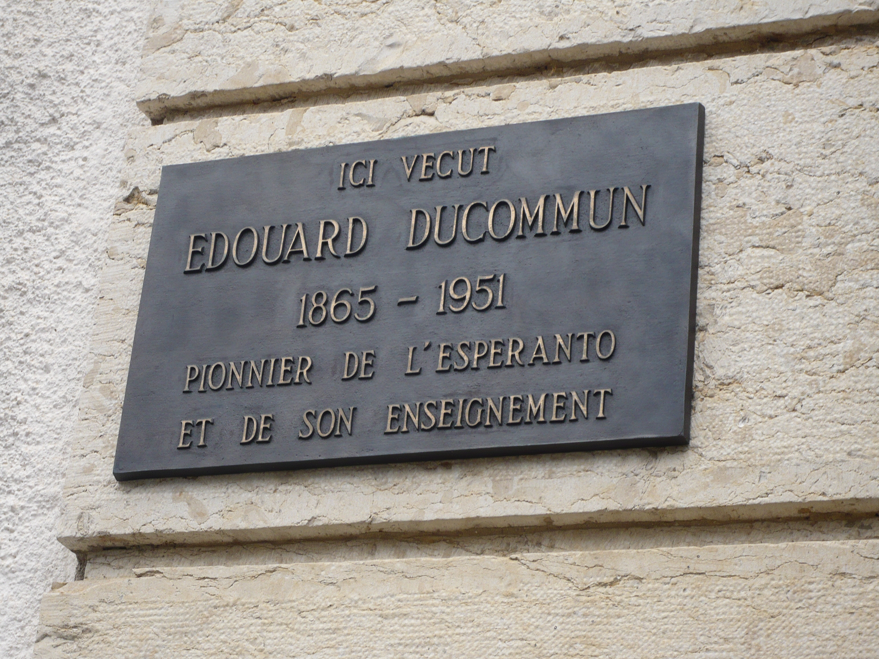 Edouard Ducommun fut un pionnier de l'enseignement de l'espéranto